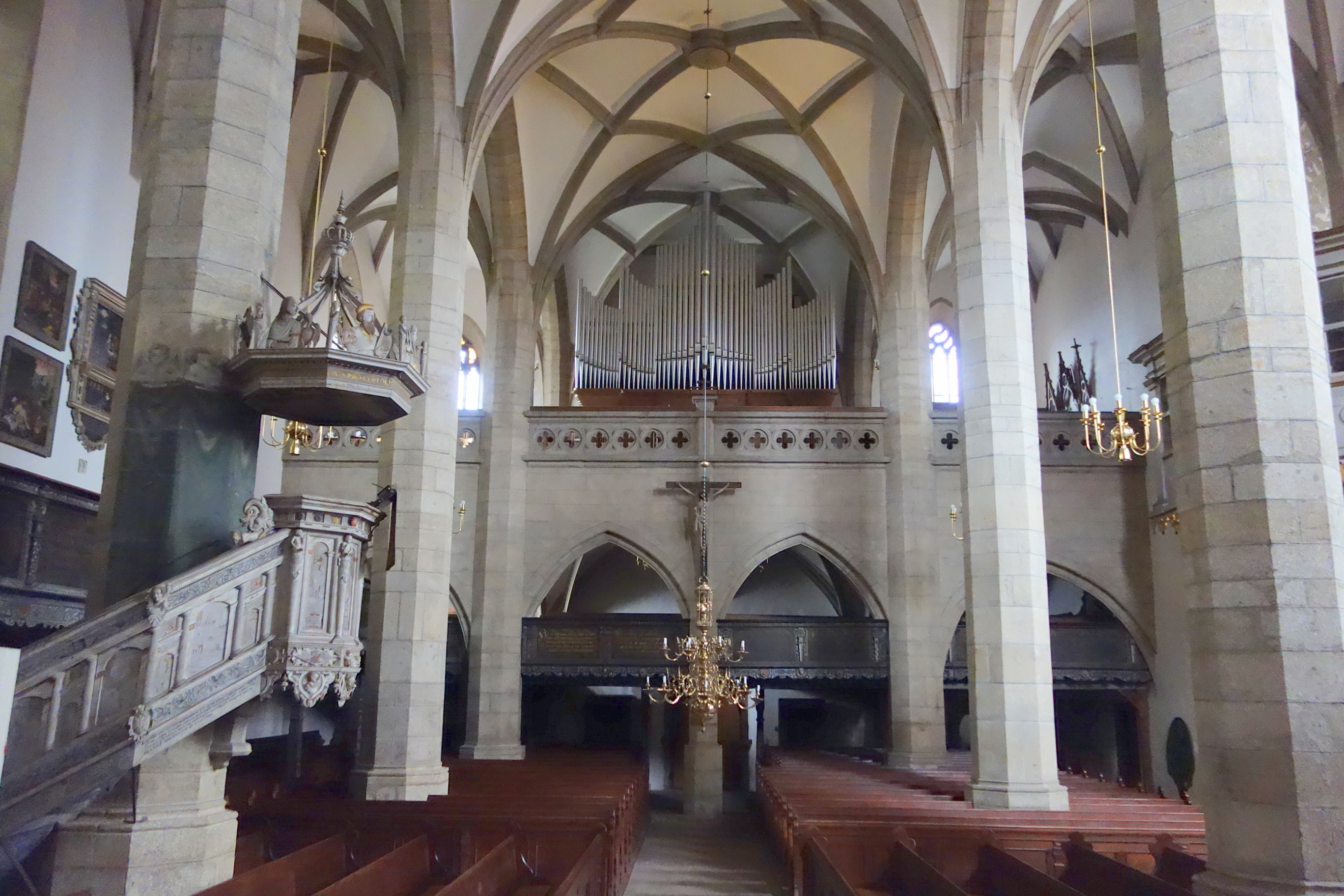 Orgel der St.-Marien-Kirche, Kamenz, Sachsen, Deutschland